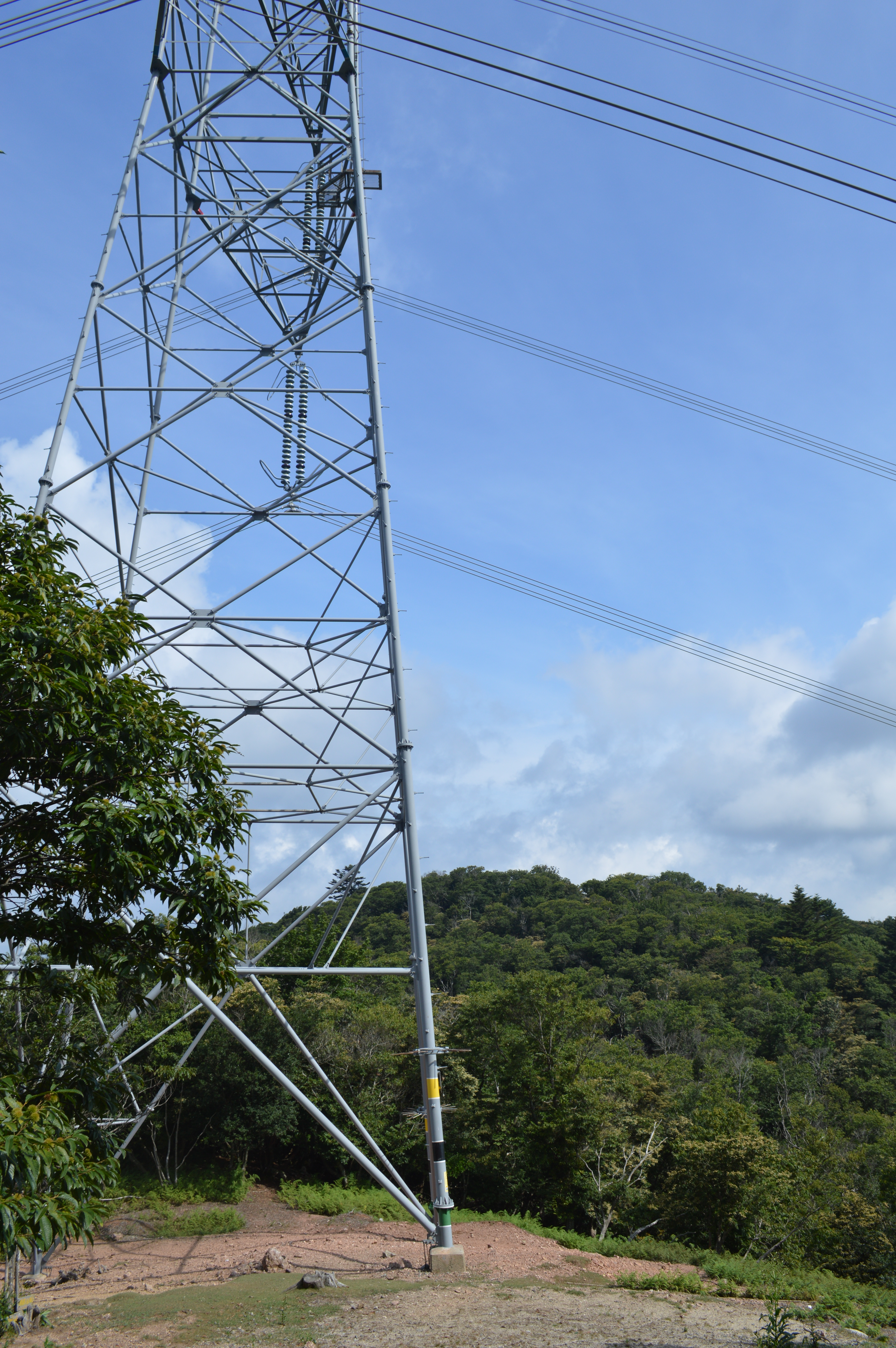 京都北山の桟敷ヶ岳、頂上近くから見た関西電力の送電線鉄塔と山頂